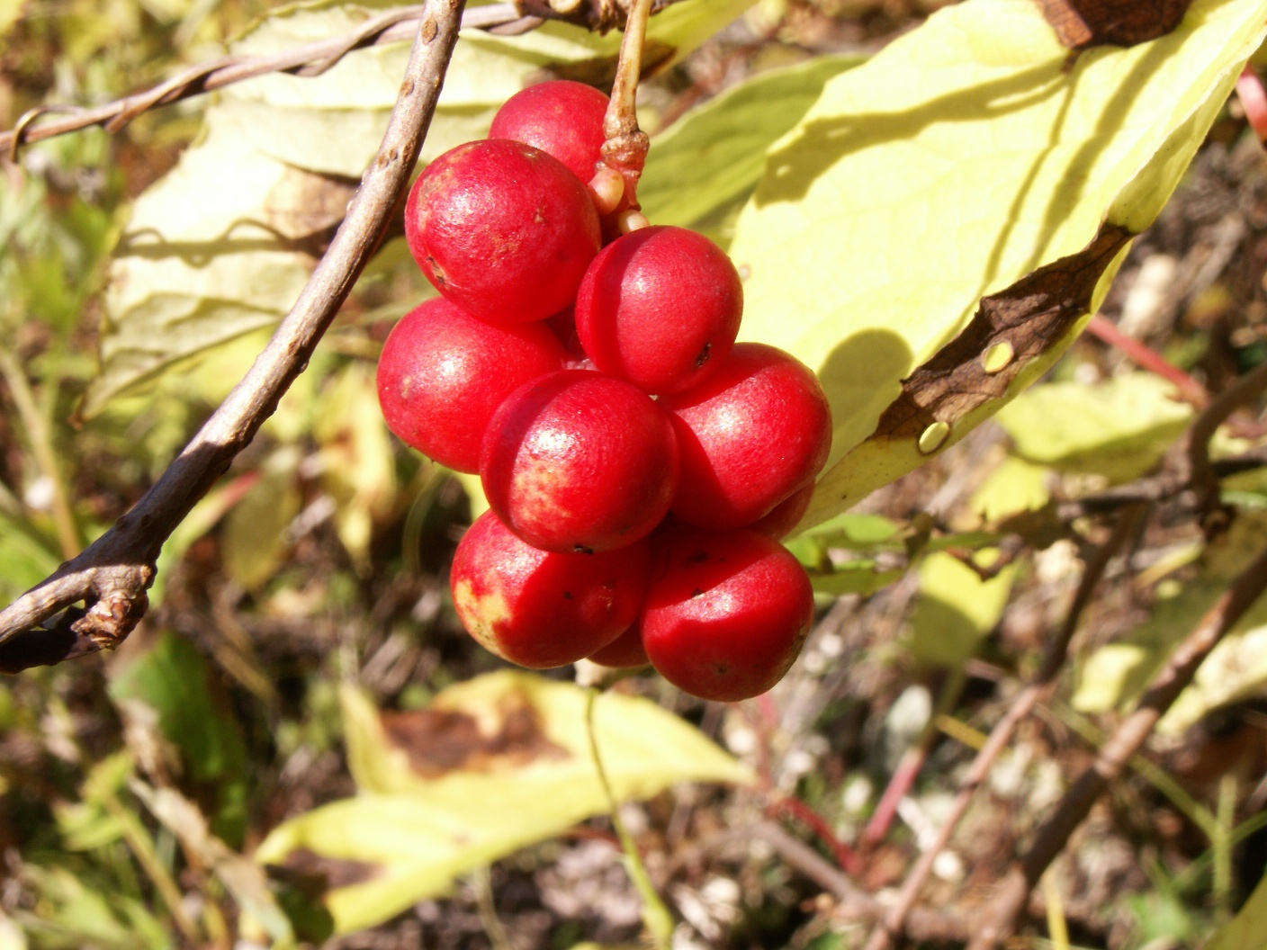 Плоды лимонника китайского, Сахалин